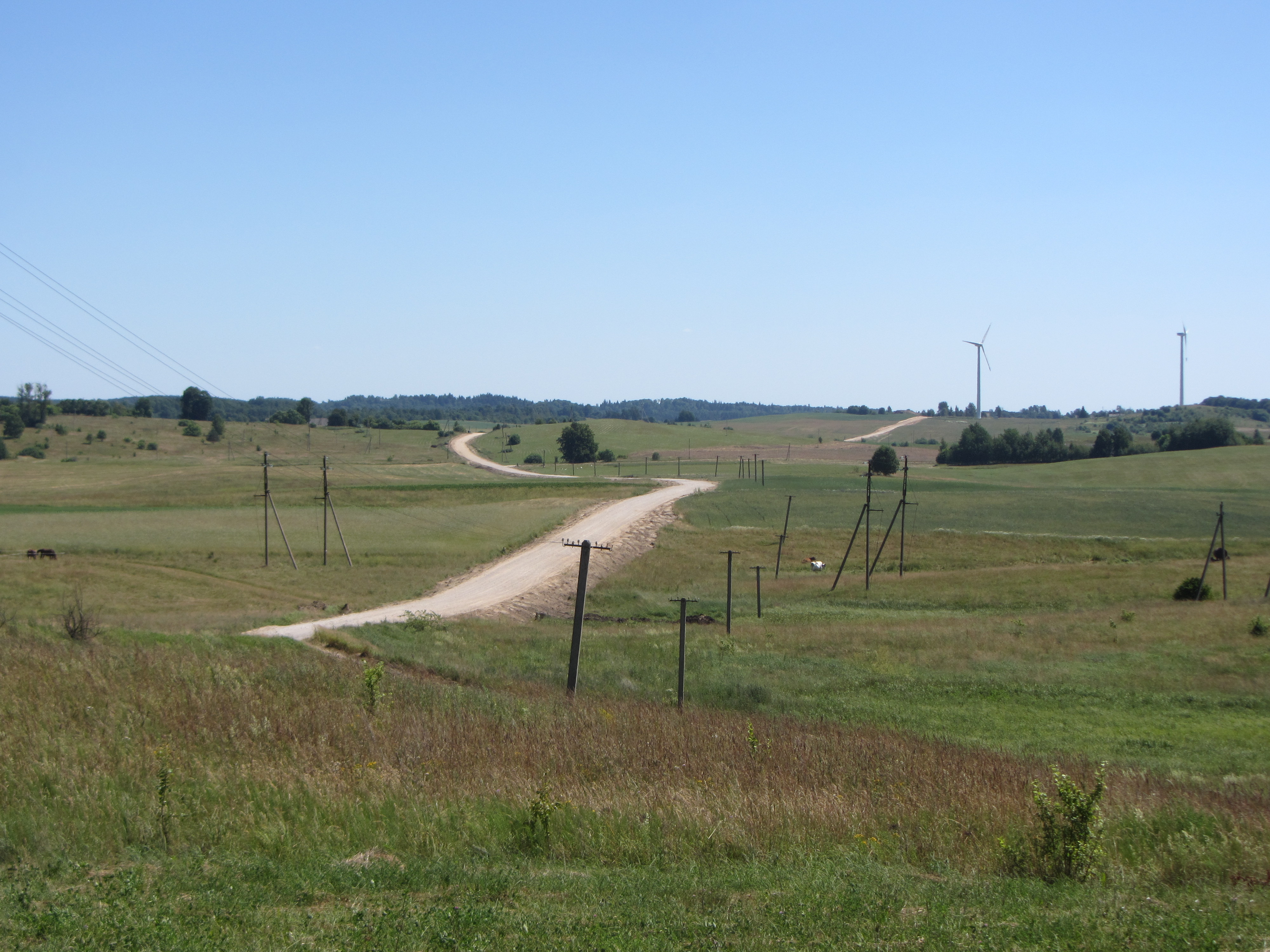 Užuguostis 59367, Lithuania